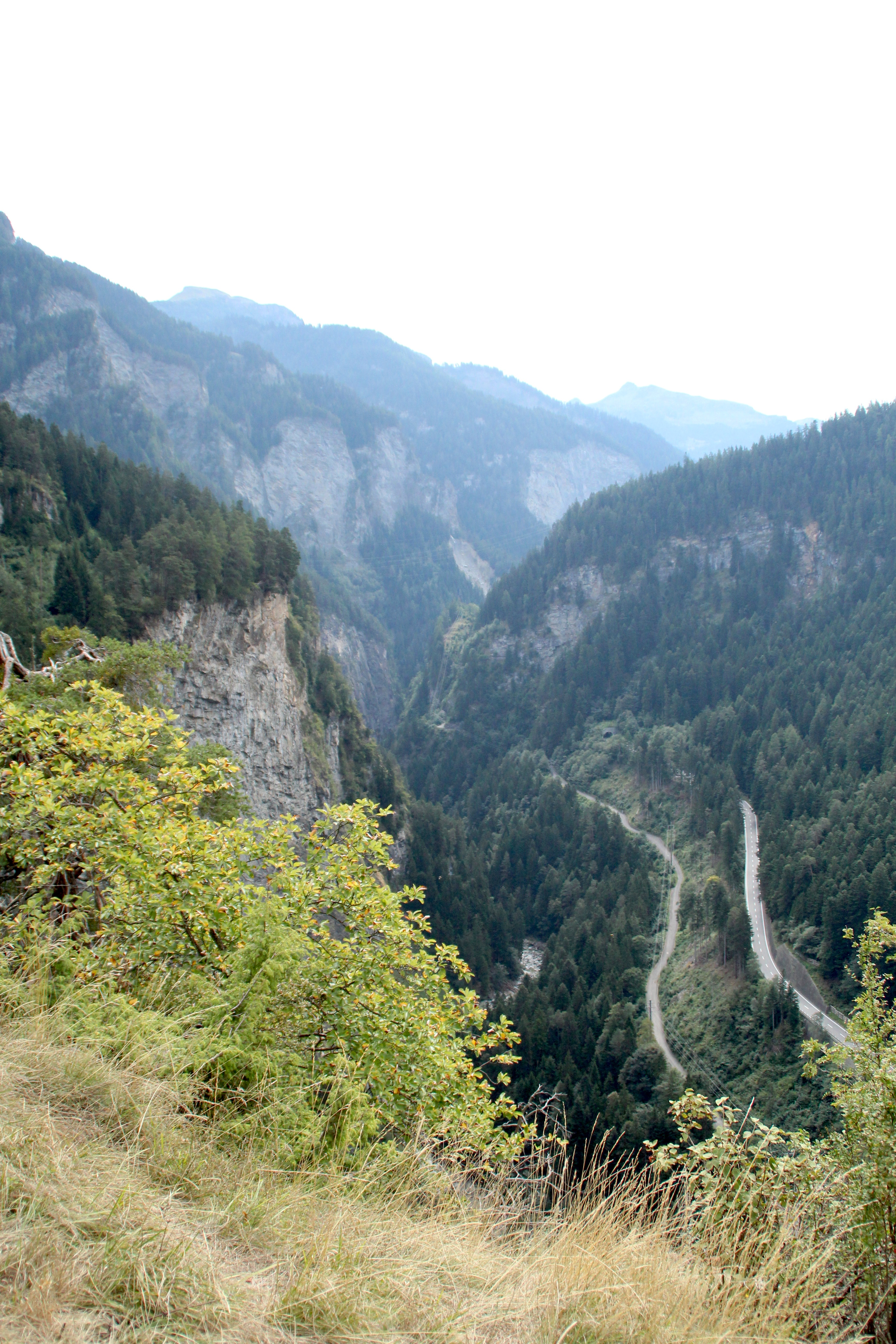 Blick in die Viamala nach Süden. Rechts die A13, links die alte Kantonsstrasse